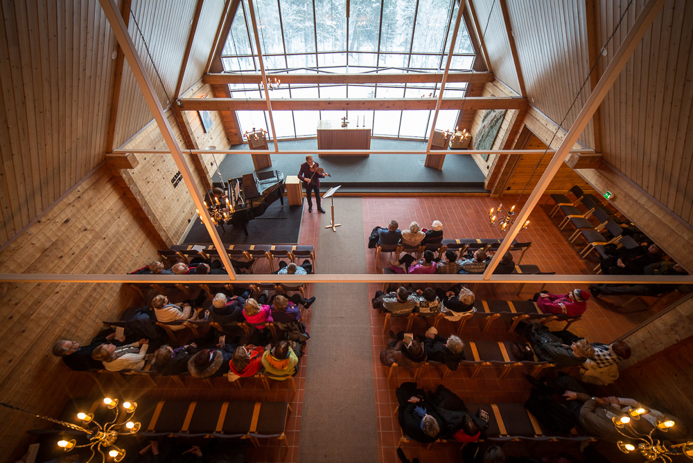 Saariselän tunturikappelista on upeat tunturimaisemat.